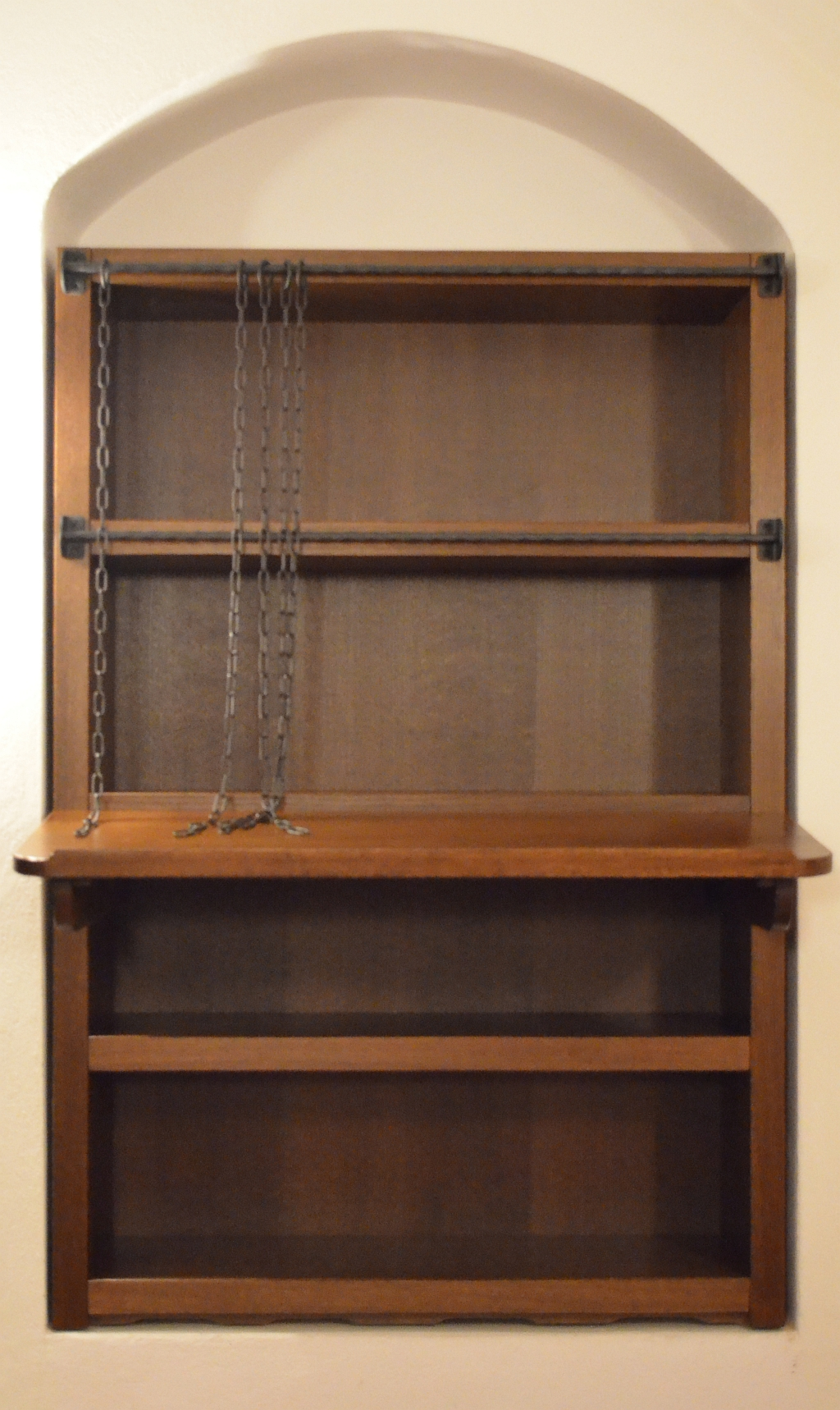 Braunschweig, Liberei: Rekonstruiertes Pultregal für Kettenbücher.